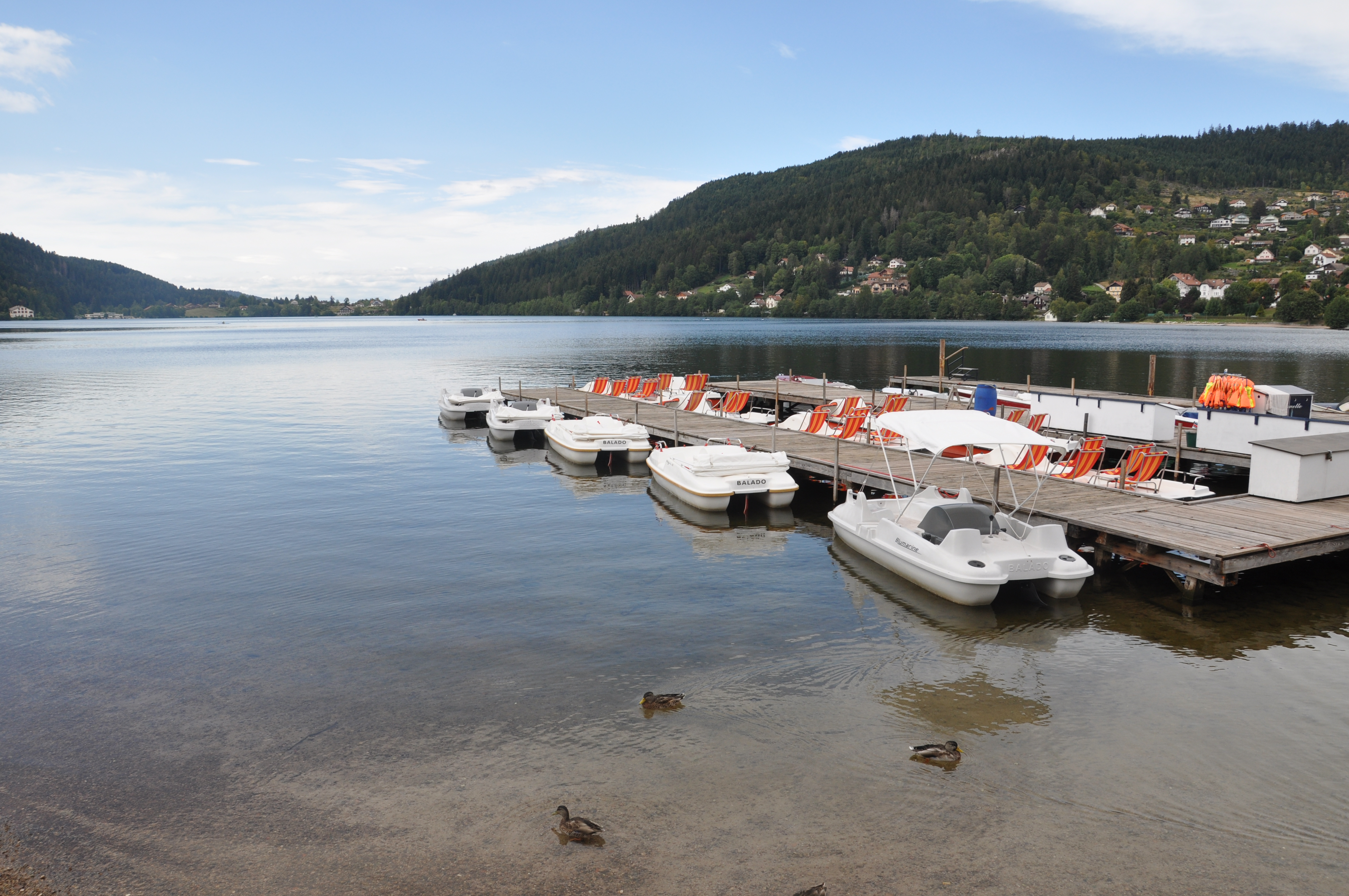 Base nautique du lac de Gerardmer